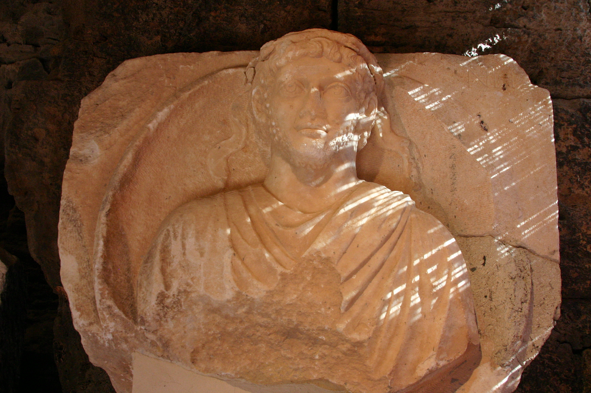 Rei Eumenes II de Pérgamo. Estátua no Museu de Hierápolis. See source.